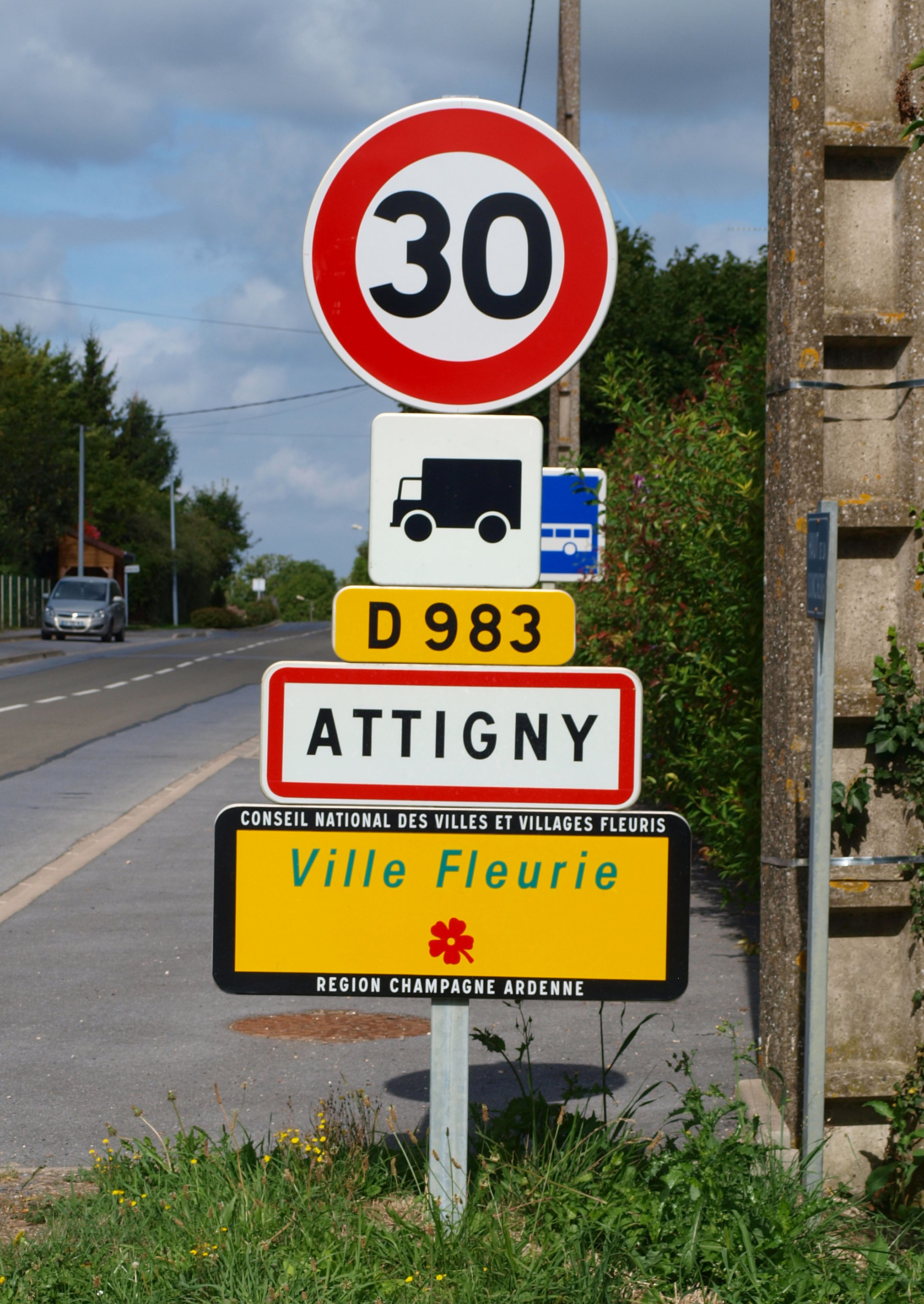 Attigny (Ardennes, France) ; panneau d'agglomération, visible en venant de Vouziers